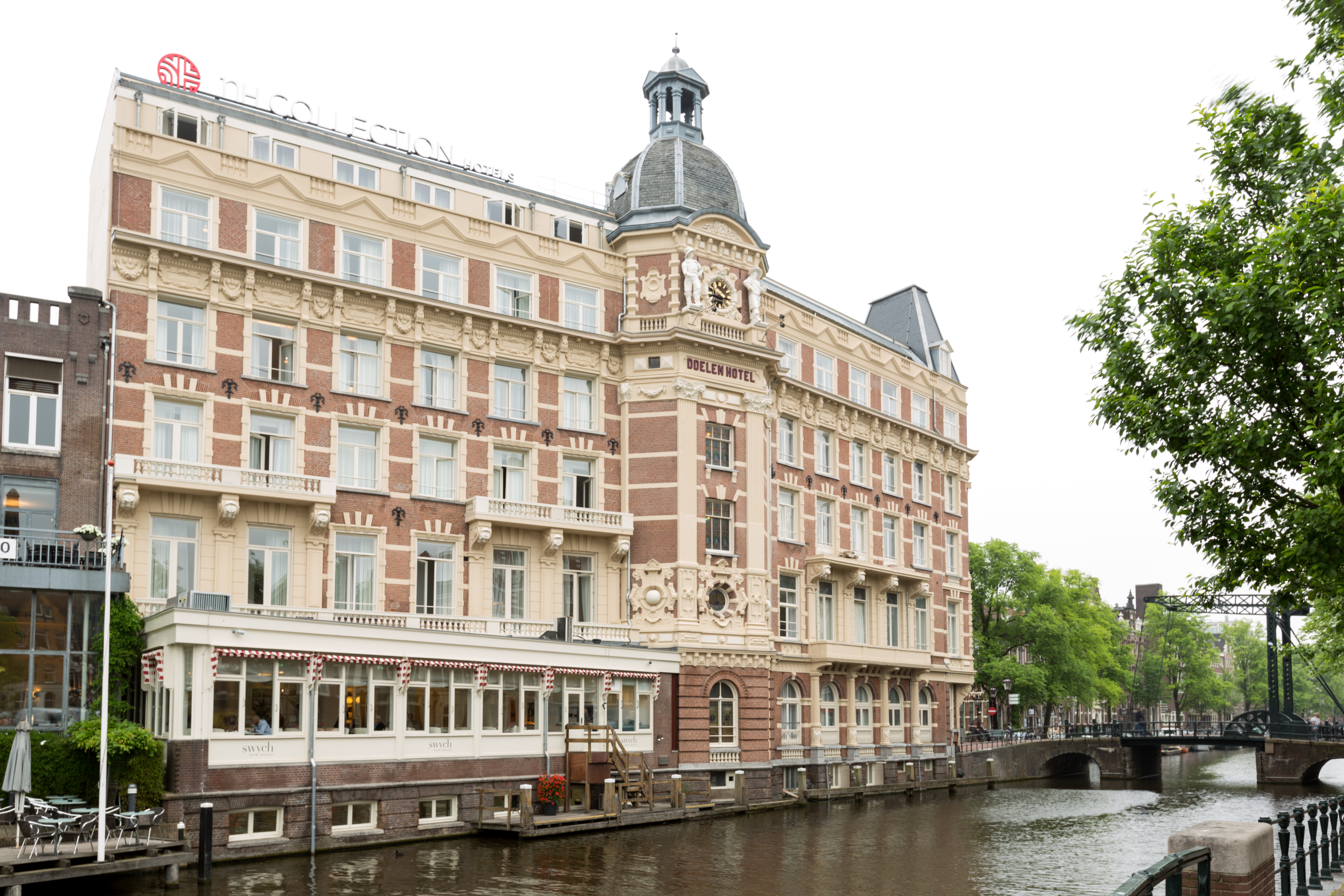 NH Colleciton Doelen - het oudste hotel van Amsterdam